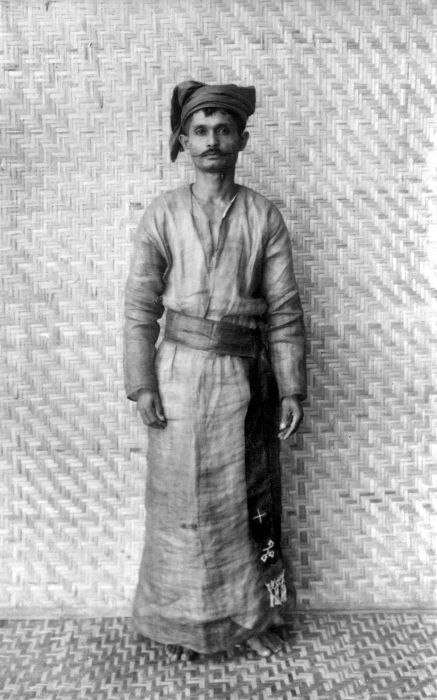 Repronegatief. Een man van Sangir in koffo kleding